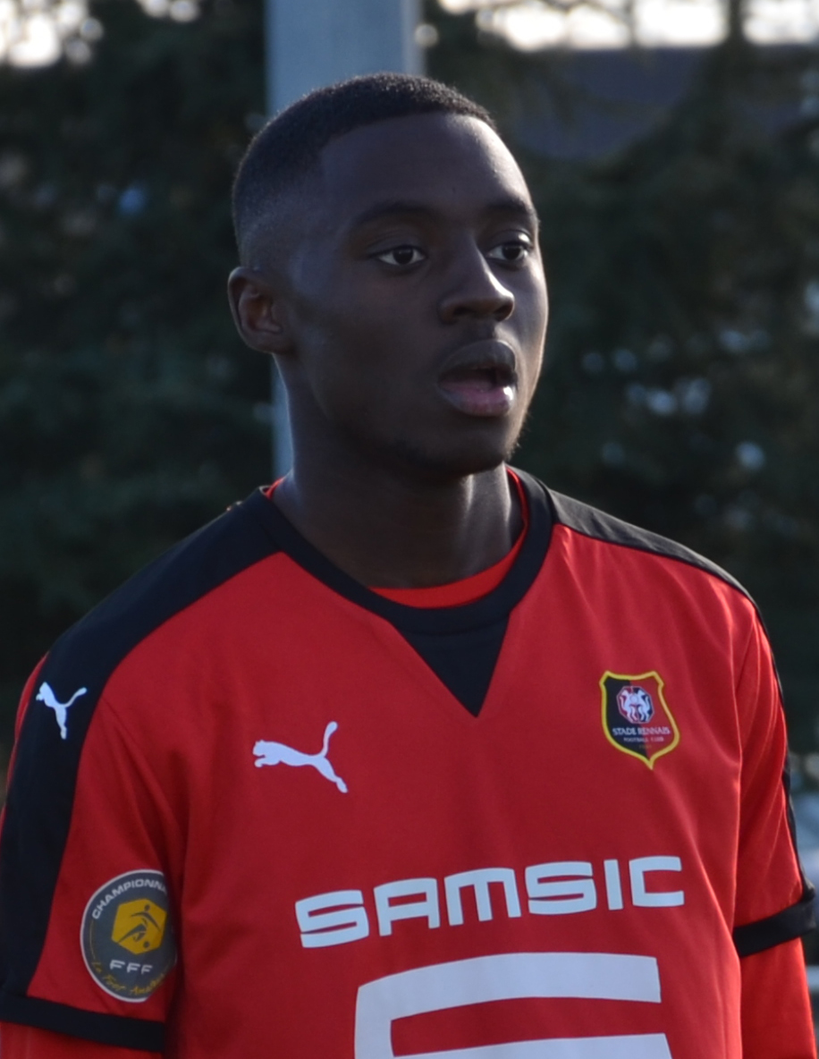 Photographie de James Léa Siliki lors d'un match de CFA2 opposant le FC Saint-Lô au Stade rennais le 9 avril 2016.